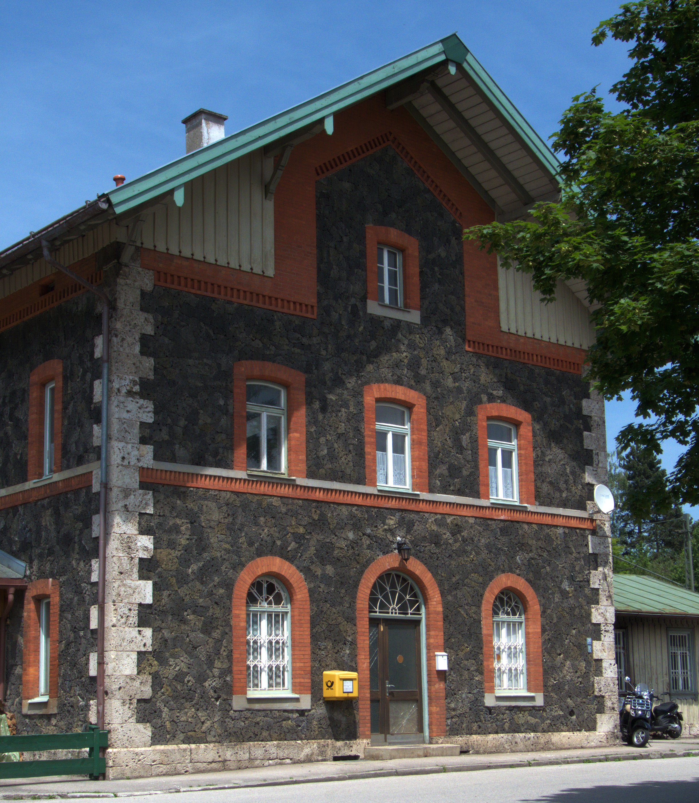 Bahnhof Bergen (Oberbayern), Bau um 1865, Baumaterial - Schlackensteine und weiße Raibler-Rauhwacke als Sockel- und Kantensteine , steht seit 1976 unter Denkmalschutz